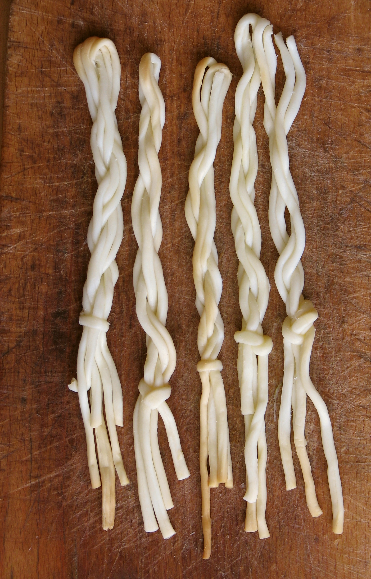 Údený korbáčik (Slovakia)